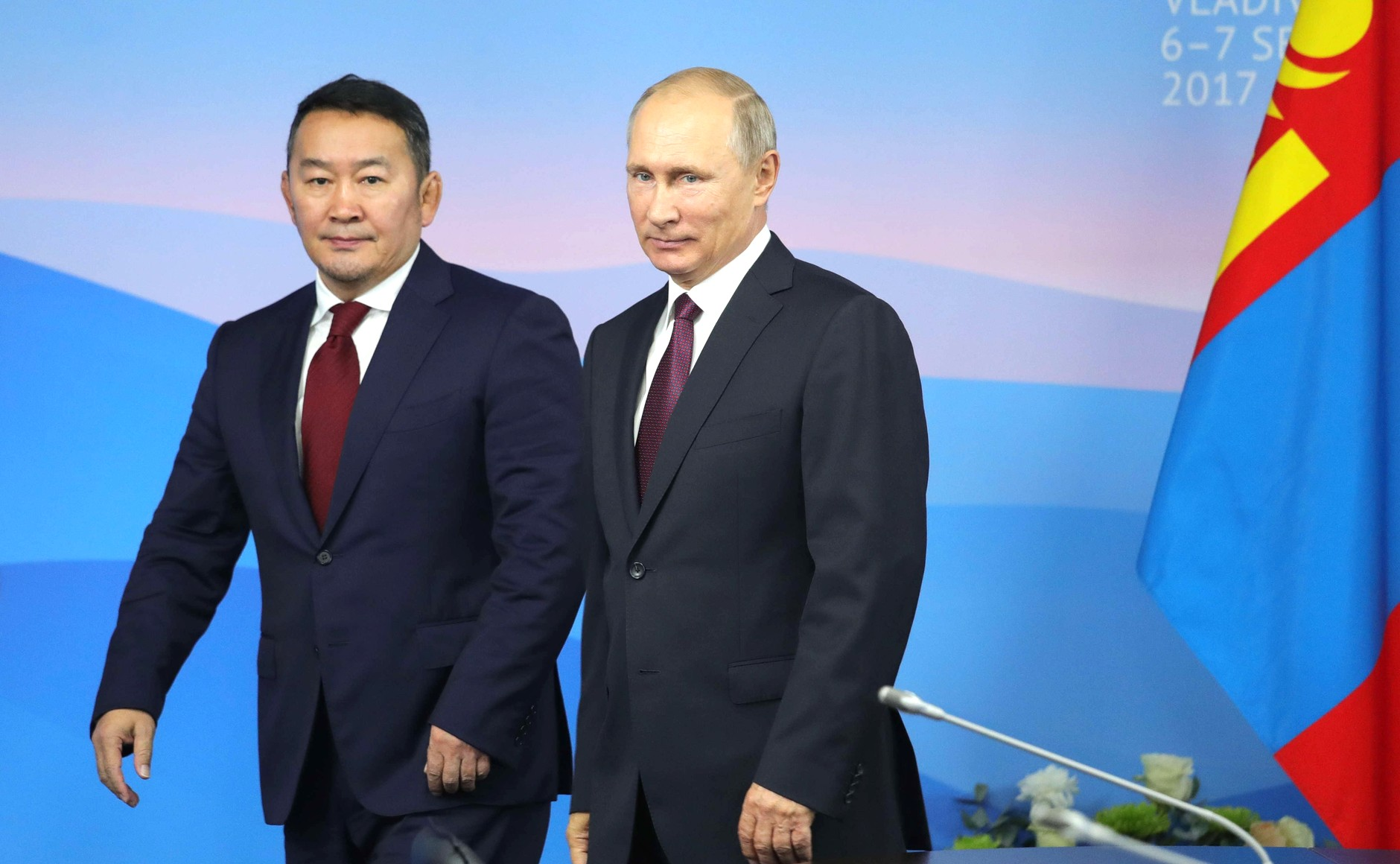 Президент России Владимир Путин с Президентом Монголии Халтмагийн Баттулгой